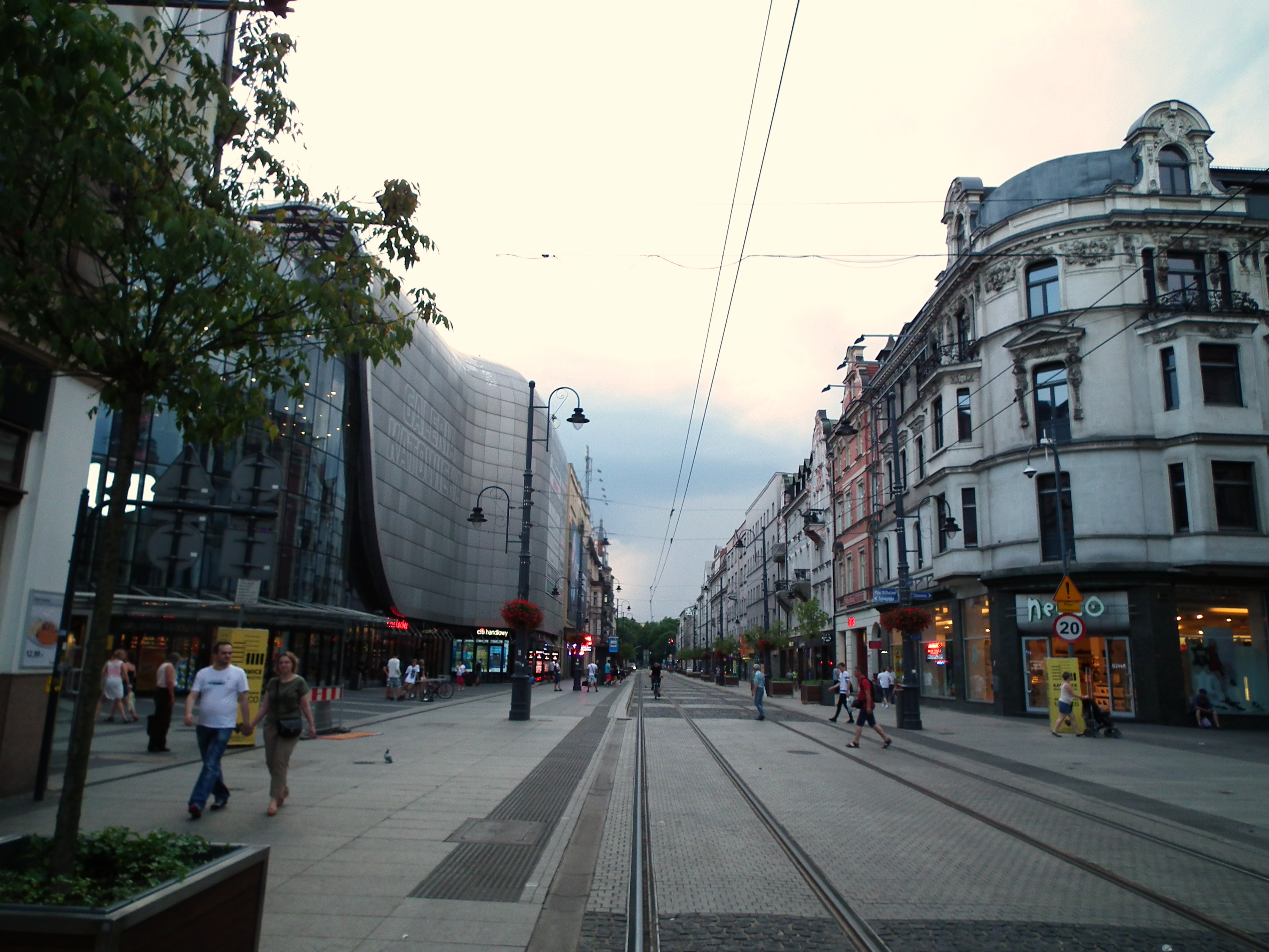 Ulica 3 Maja w Katowicach.